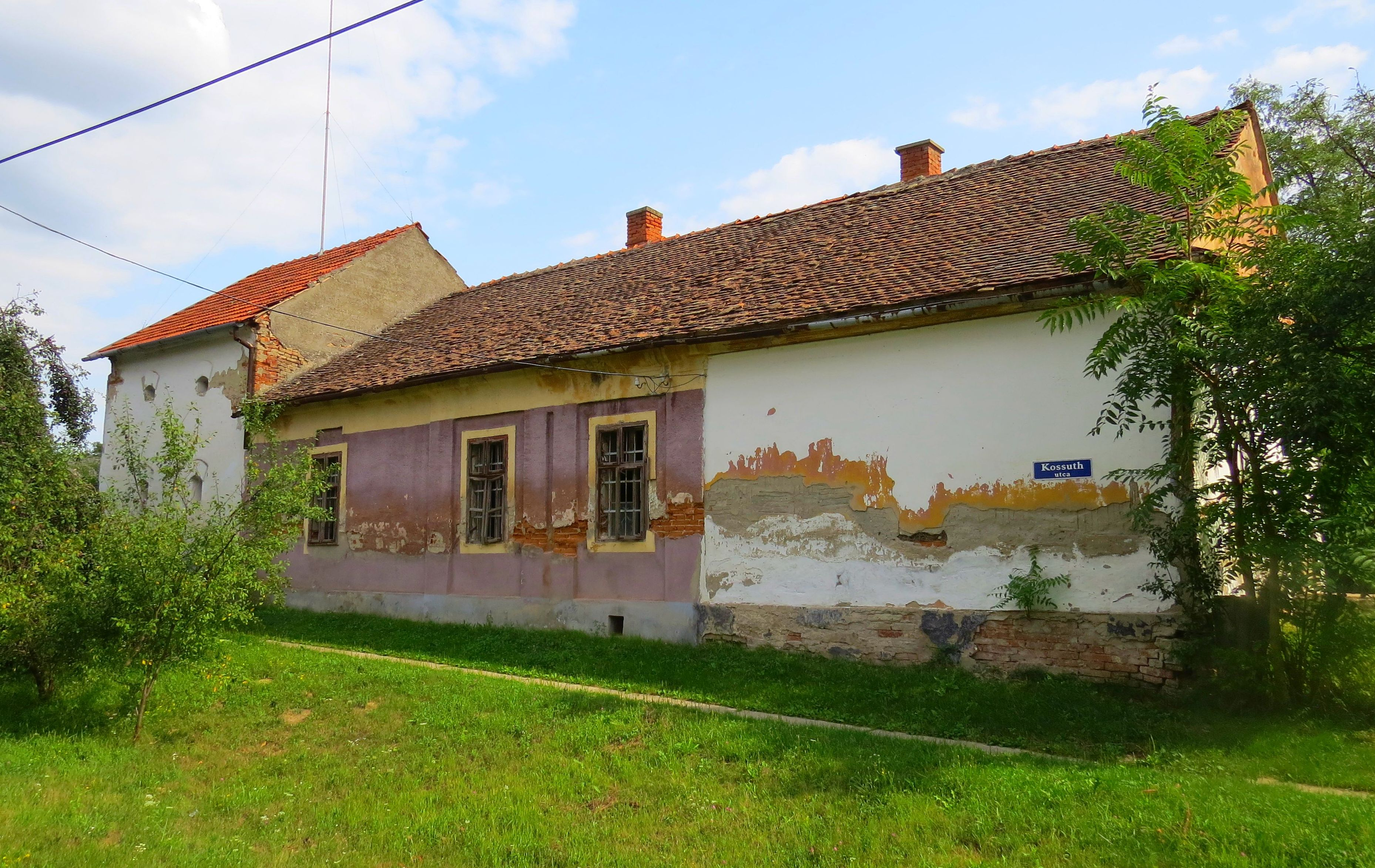 A Harsányi kúria Furtán, a Kossuth utcában. 2018 óta műemléki érték.